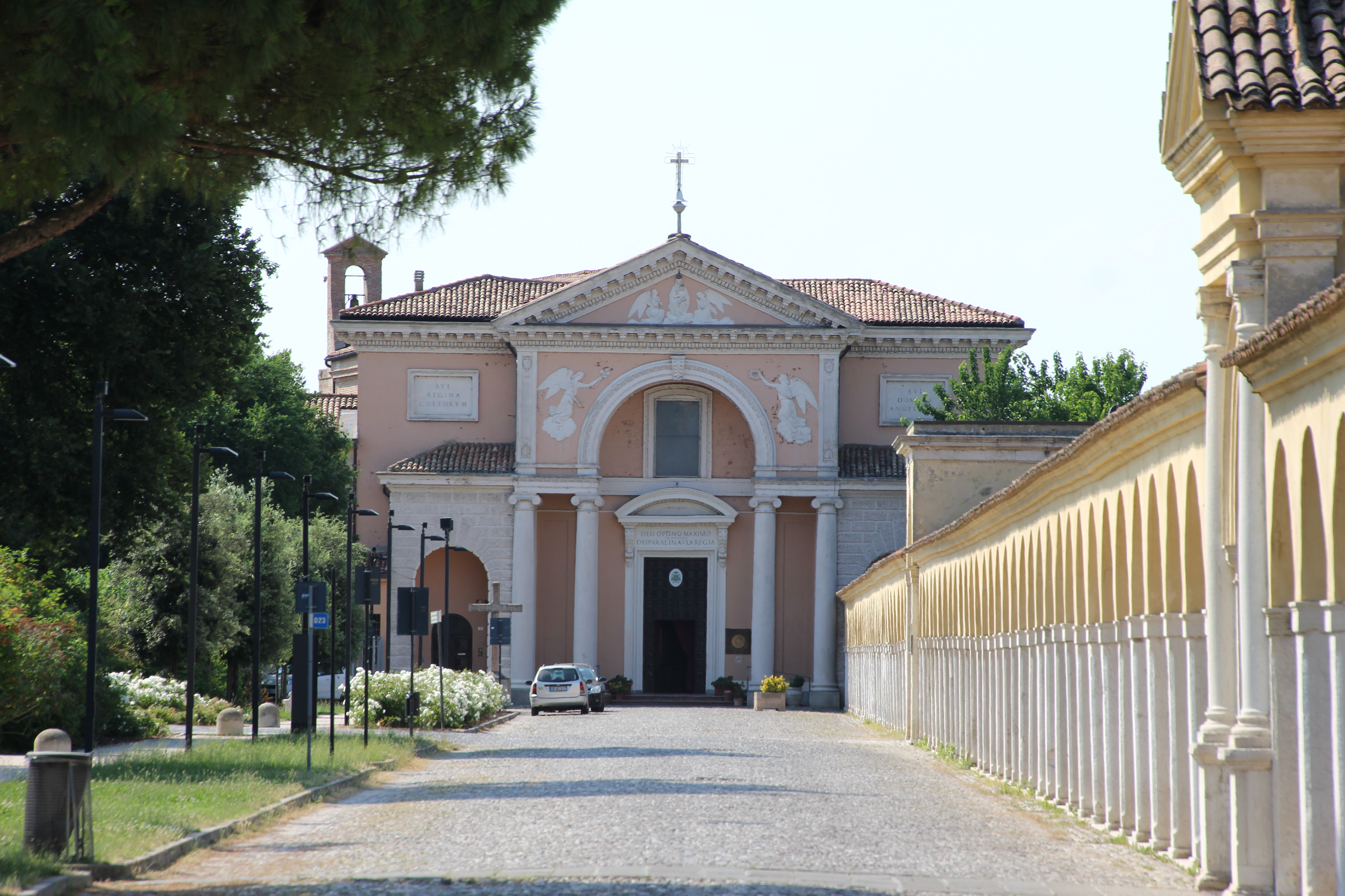 Comacchio, santuario di Santa Maria in Aula Regia